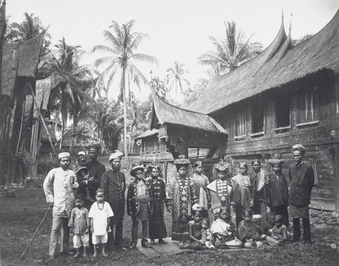 Foto. Groepsportret van een Minangkabau familie